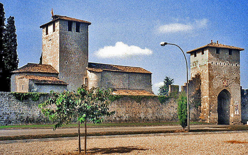 Église et enceinte nord de la cité de Vianne It is indexed in the Base Mérimée, a database of architectural heritage maintained by the French Ministry of Culture, under the references PA00084264 and PA00084263 .